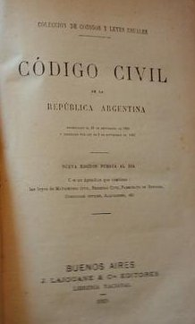 Página del Código Civil de la República de Argentina. Edición de 1923. Colección de de Códigos y Leyes usuales. Buenos Aires. J. Lajouane & Cía Editores, Librería Nacional.